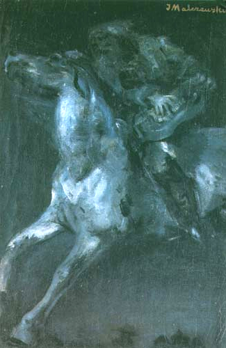 Wernyhora